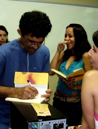 Marvilla autografando "Os mortos estão no living" no evento "Conversando com o autor", da Faculdade Castelo Branco, em novembro de 2007.